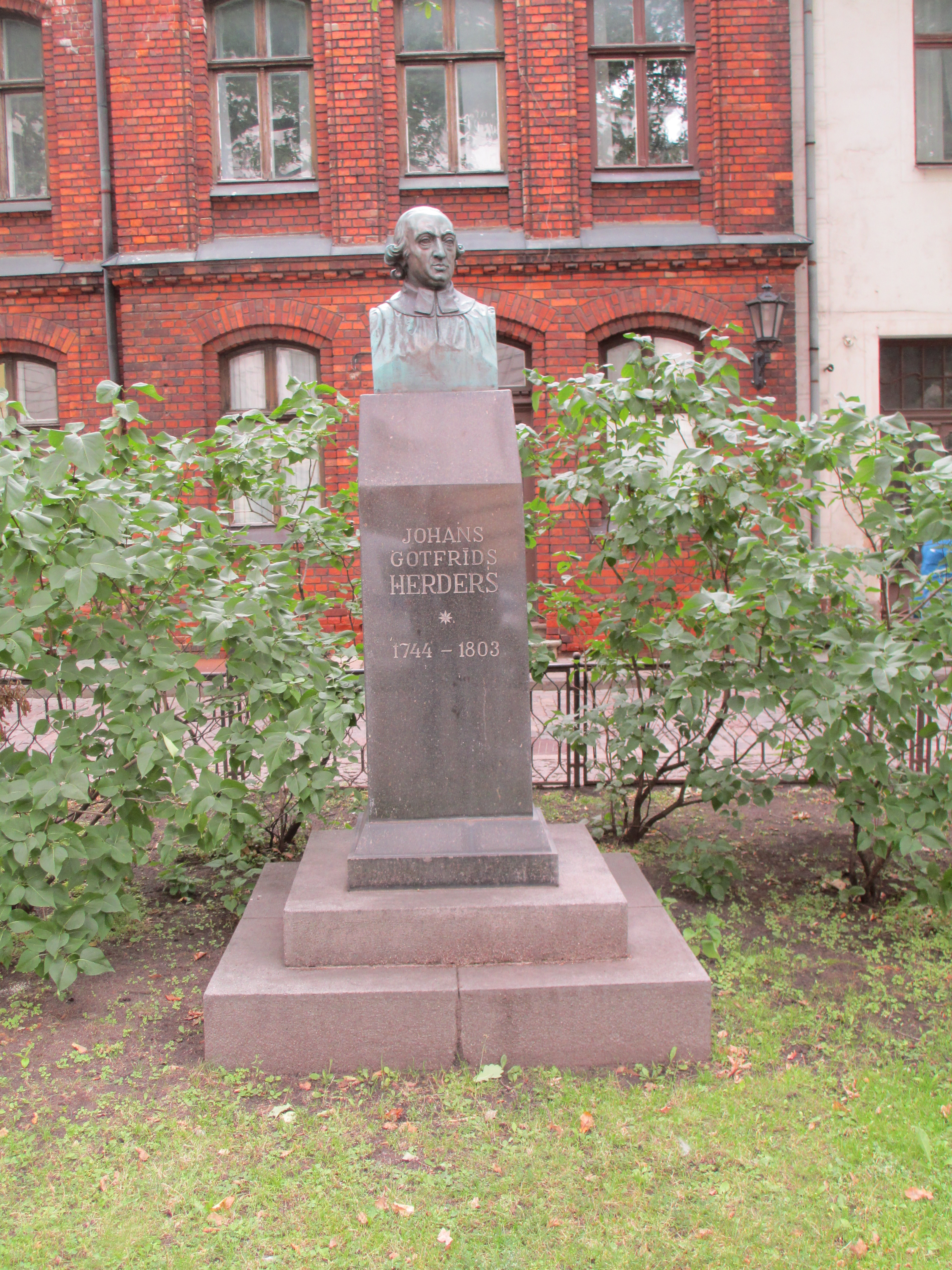 פסל של יוהאן גוטפריד הרדר בריגה